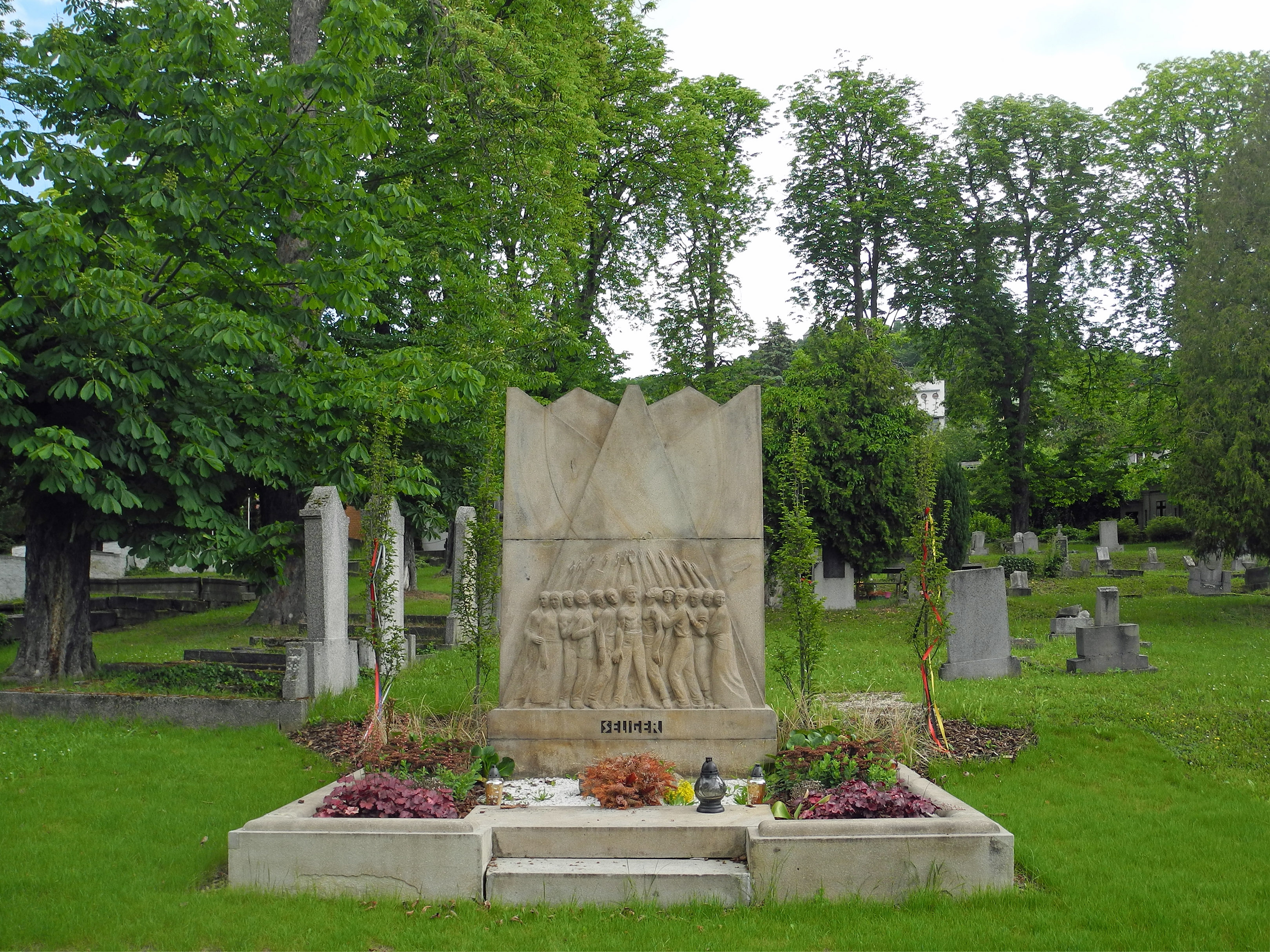 Grabstätte Josef Seliger (1870–1920) – Vorsitzender der Deutschen sozialdemokratischen Arbeiterpartei (DSAP) – auf dem alten Schönauer Friedhof in Bystřany, U Hřbitova, mit dem Grabmal von Johannes Watzal – ein Sandsteinblock mit 5 Spitzen, die die 5 Erdteile der Internationale verkörpern